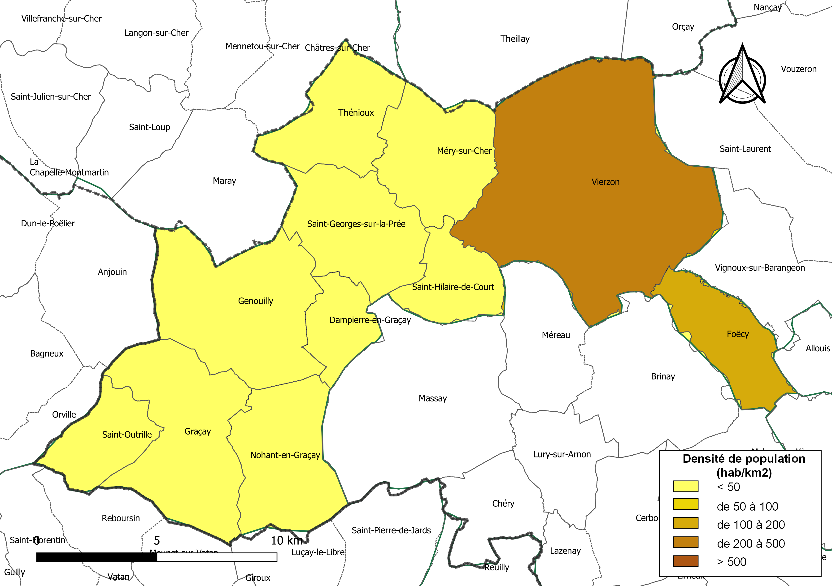 Carte des densités de population (millésimée 2016) des communes de la communauté de communes la Communauté de communes Vierzon-Sologne-Berry, département du Cher, France. Composition au 1er janvier 2019.